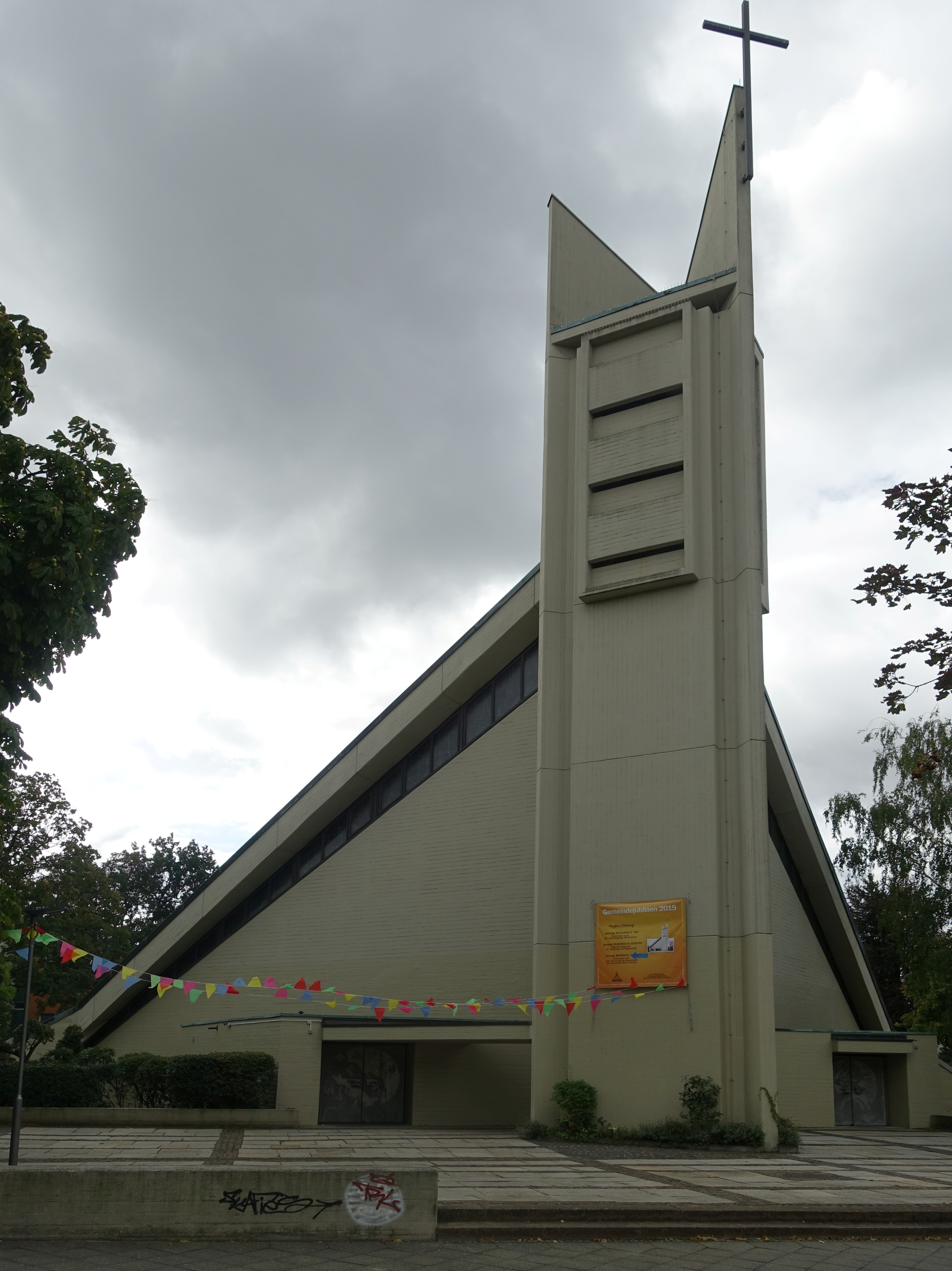 Straßenseite der Kirche